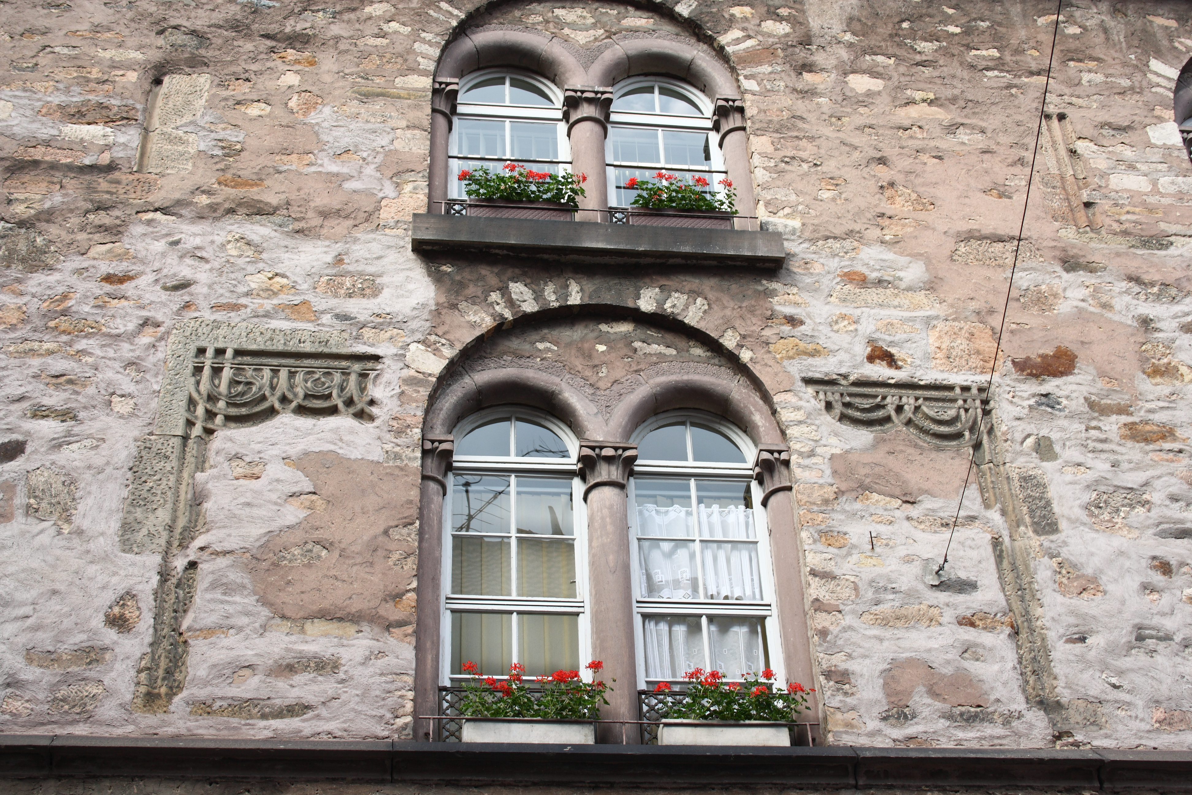 Weinhaus in Alsfeld im Vogelsbergkreis Hessen), Markt 3